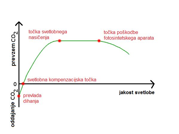 Graf odvisnosti hitrosti fotosinteze (merjene posredno preko prevzema CO2) v odvisnosti od jakosti svetlobe.